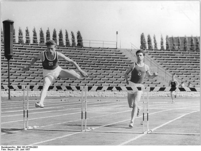 Hille, Enders Zentralbild Beyer 30.6.1957 Berliner Leichtathletik-Meisterschaften im Jahnstadion. Am vergangenen Wochenende, vom 28. bis 30.6.1957, fanden im Friedrich-Ludwig-Jahn-Sportpark die Berliner Leichtathletik-Meisterschaften statt. Da zur gleichen Zeit der Länderkampf gegen Rumänien durchgeführt wurde, hatte der Nachwuchs Gelegenheit, sich stärker in den Vordergrund zu schieben. UBz: Während des 400-m-Hürden-Endlaufes. Die beiden Erstplazierten, Hille (links) und Enders (beide Einheit) biegen in die Zielgerade ein. Hille siegte mit knappem Vorsprung vor seinem Klubkameraden.